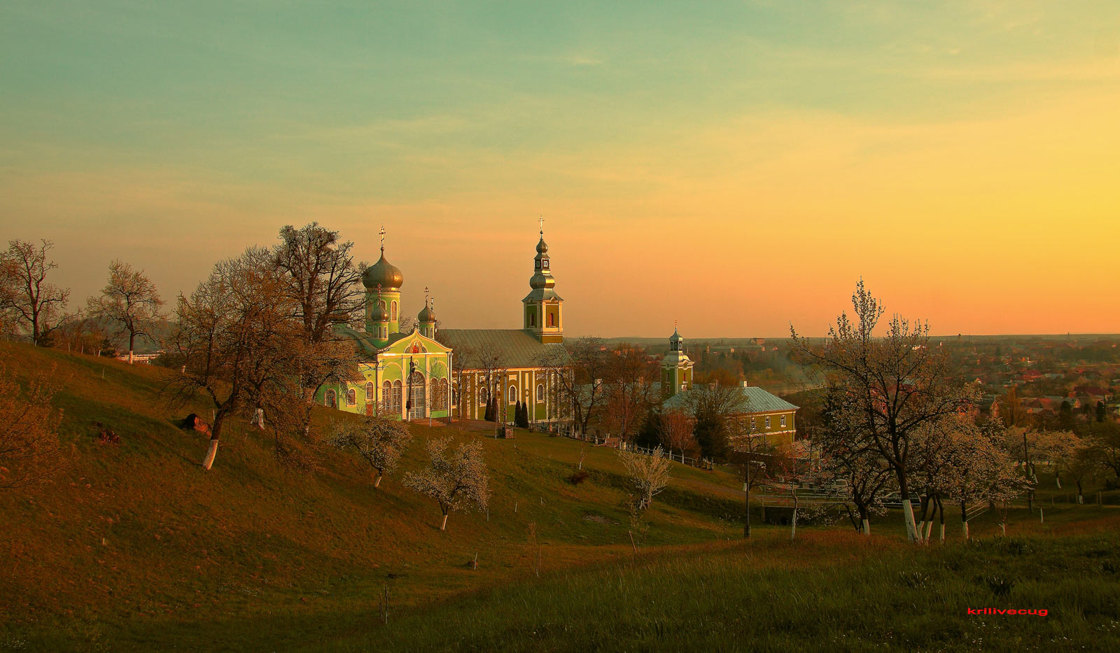 Свято - Миколаївський монастир в Мукачево